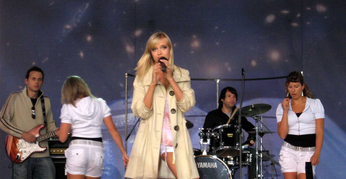 The Jet Set na dniu Otwartym TVP (9 września 2007)